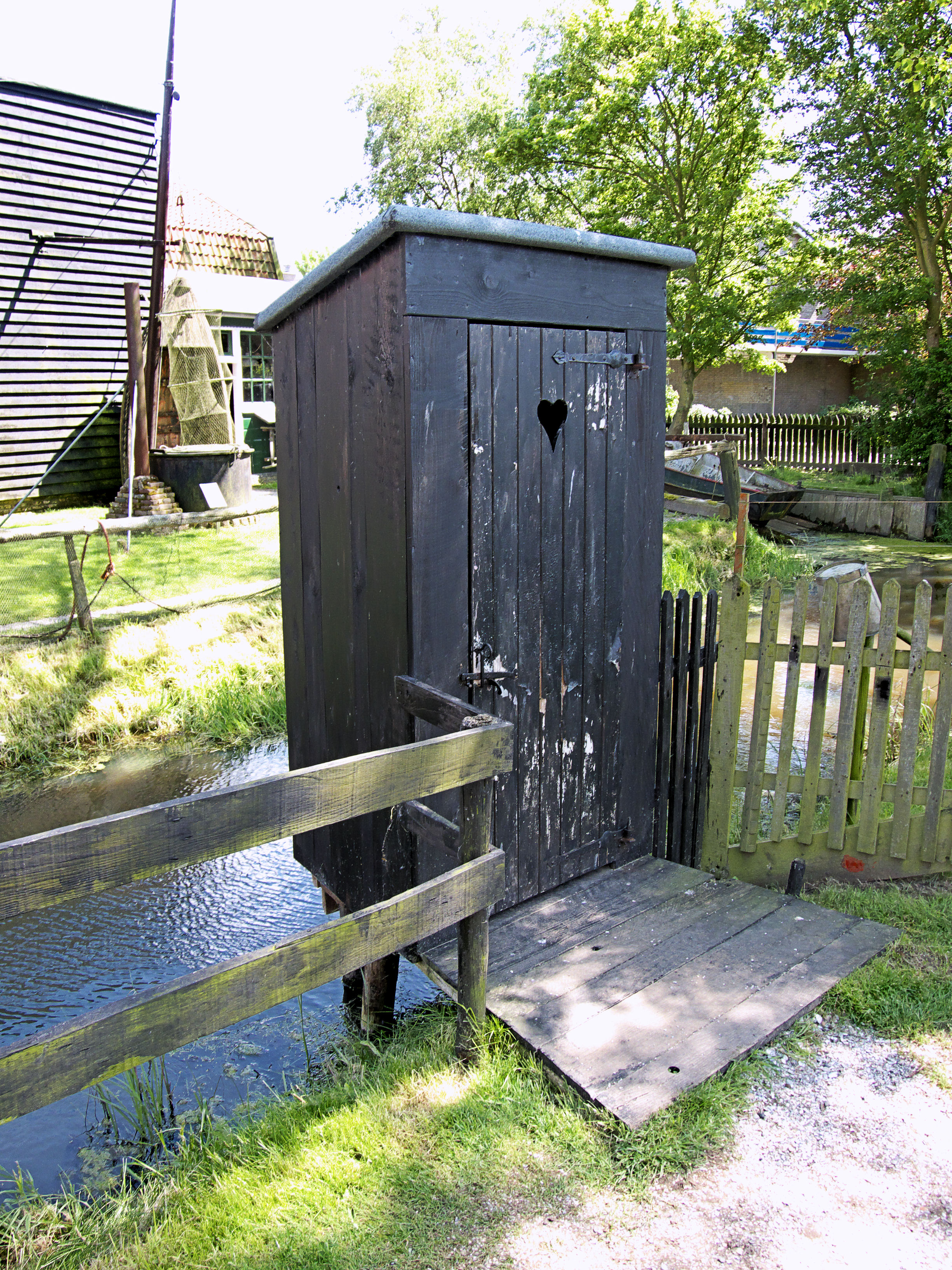 Toilethuisje